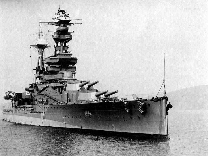 HMS Royal Oak (08) in 1937.